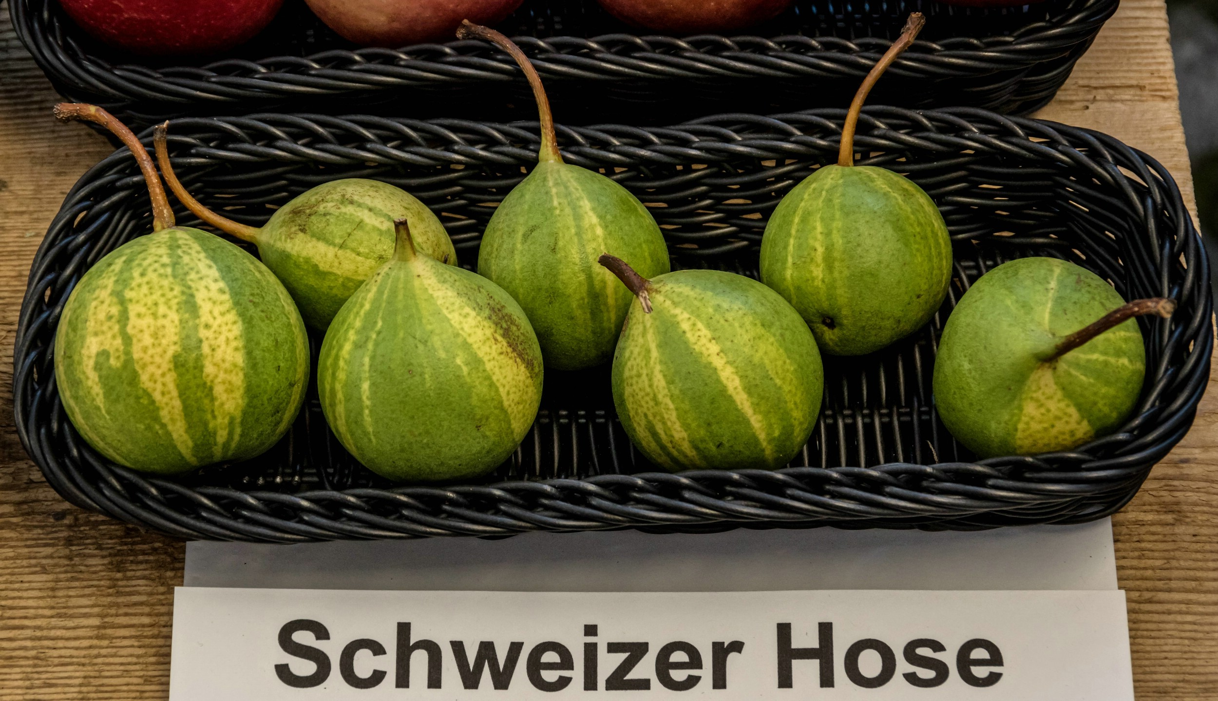 Ausstellung von alten Apfelsorten, von denen es im Badischen noch tragende Bäume gibt. Alle Aufnahmen au dem Oktober 2015. Diese Birnensorte war dort auch zu sehen